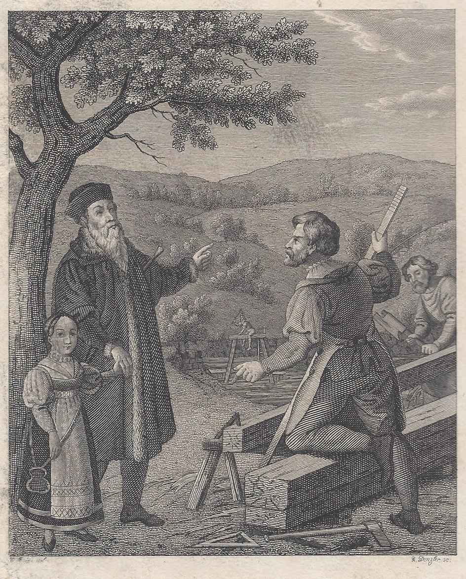 Hans Rebmann, geführt durch eine Enkelin, erteilt die Anweisungen zum Bau des Blindenstegs. Stahlstich von Rudolf Denzler um 1830.